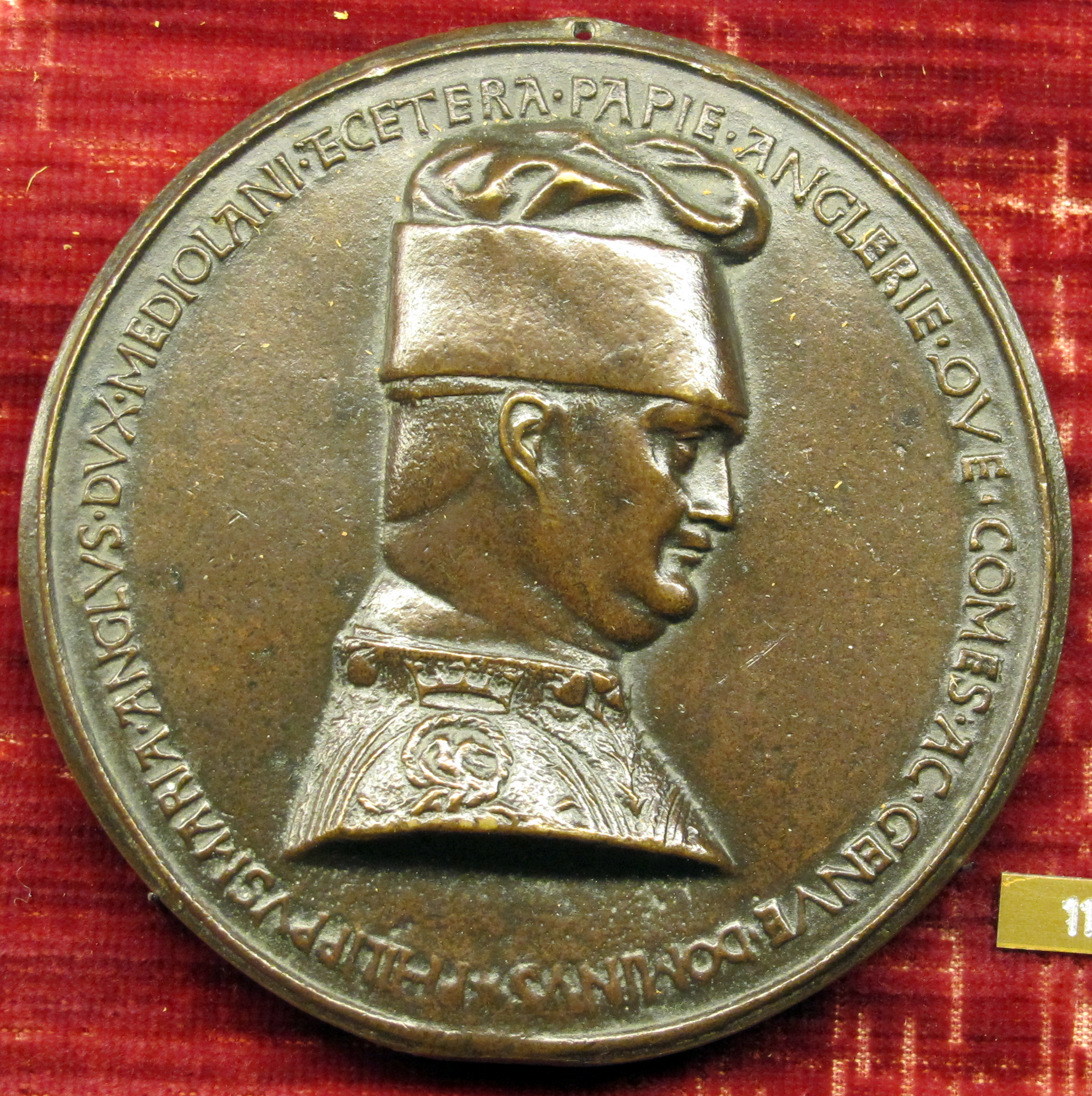 Pisanello, medagli di filippo maria visconti, recto